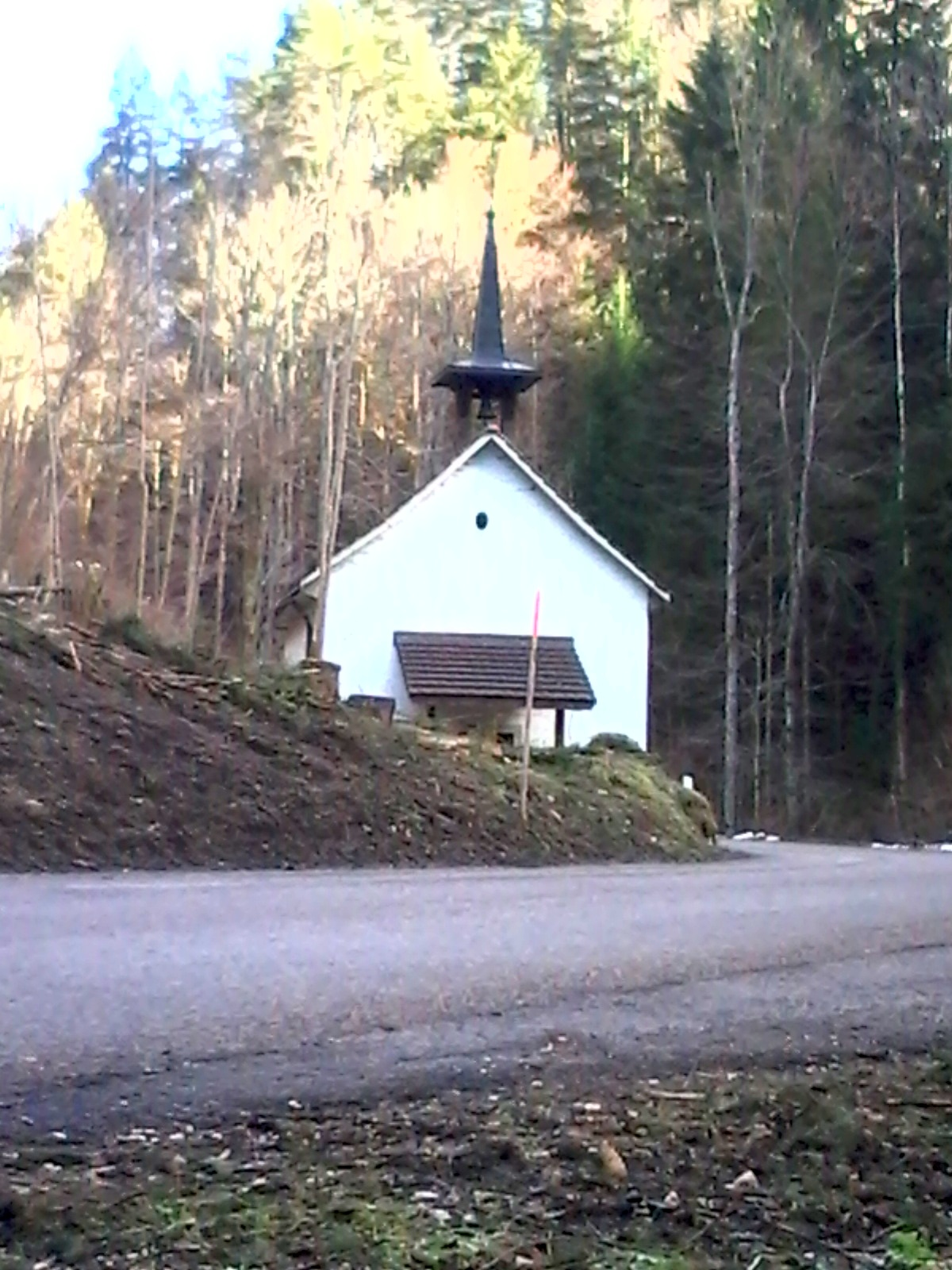 Chapelle de la Scheulte, hiver 2014, Paroisse de Mervelier-La Scheulte